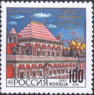 Почтовая марка России из серии «Архитектура Московского Кремля». На марке изображен Теремной дворец. Художник — М. Слонов. Номер по каталогу ЦФА — 123. Тираж — 1,8 млн экз.